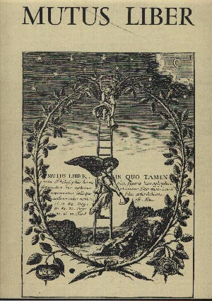 Le Mutus Liber (couverture). Traduction : Mutus Liber, ou "Le Livre Muet" Première parution par privilège du Roy le 8 novembre 1676 "Le livre sans parole, dans lequel est toutefois présenté en figures hiéroglyphiques la totalité de la philosophie hermétique, sacrée pour Dieu miséricordieux et trois fois grand, sâ€'adresse uniquement aux fils de l'art et le nom de son auteur est Altus." Planches alchimiques sans texte .